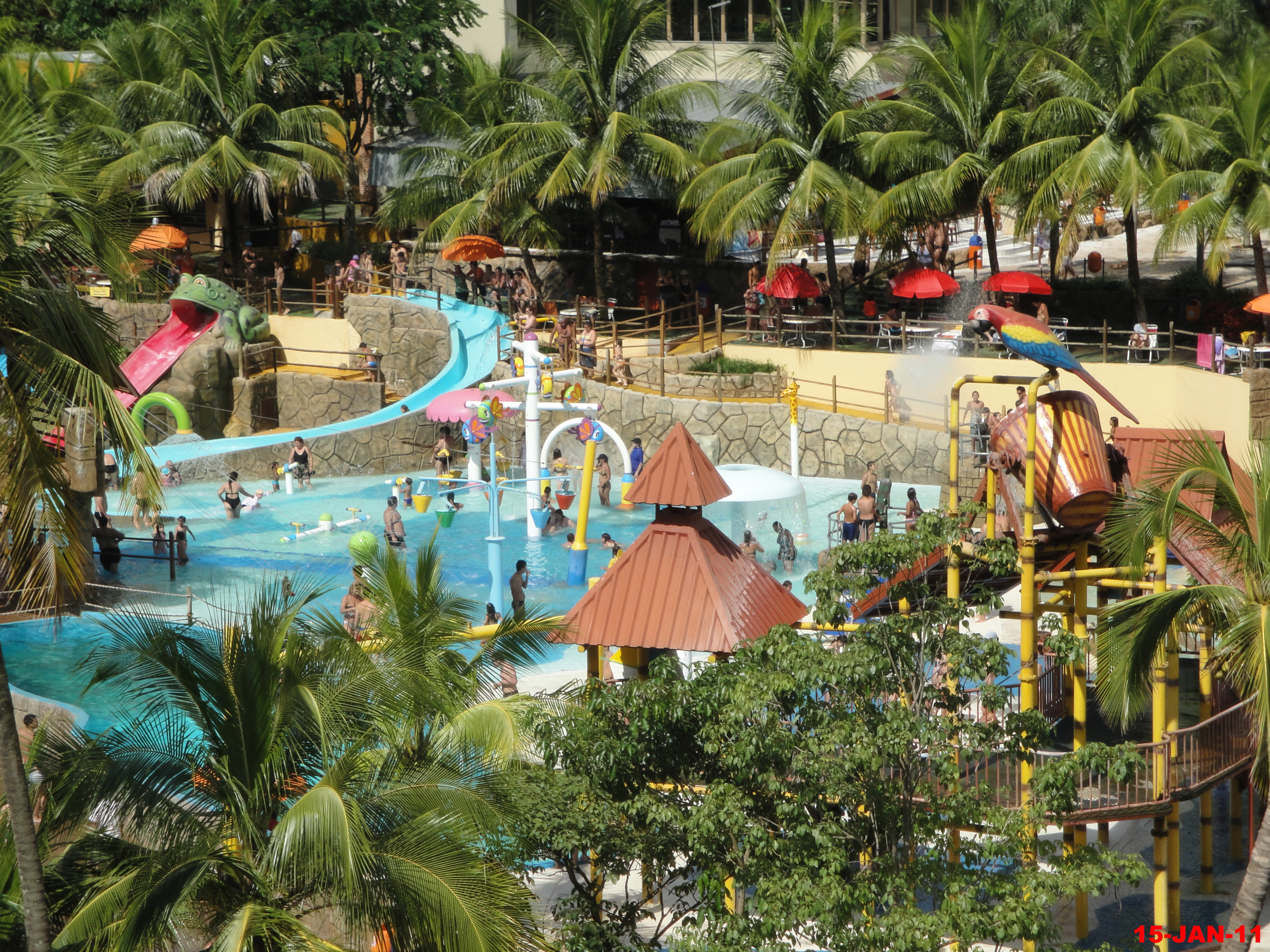 Thermas dos Laranjais, Olímpia - Parque Aquático Infantil e Baldão de água